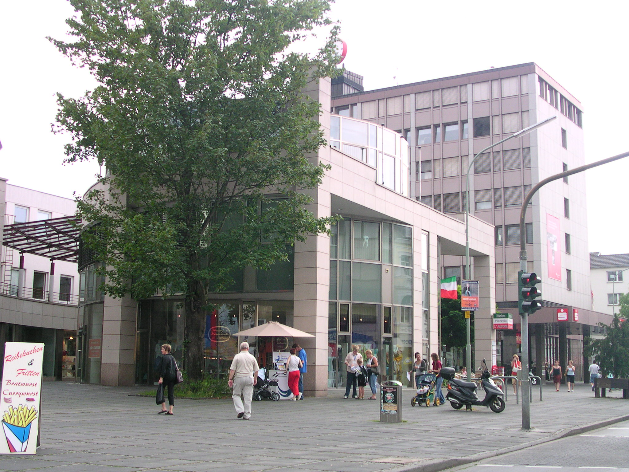 Eschweiler, Sparkasse mit Erweiterungsbau